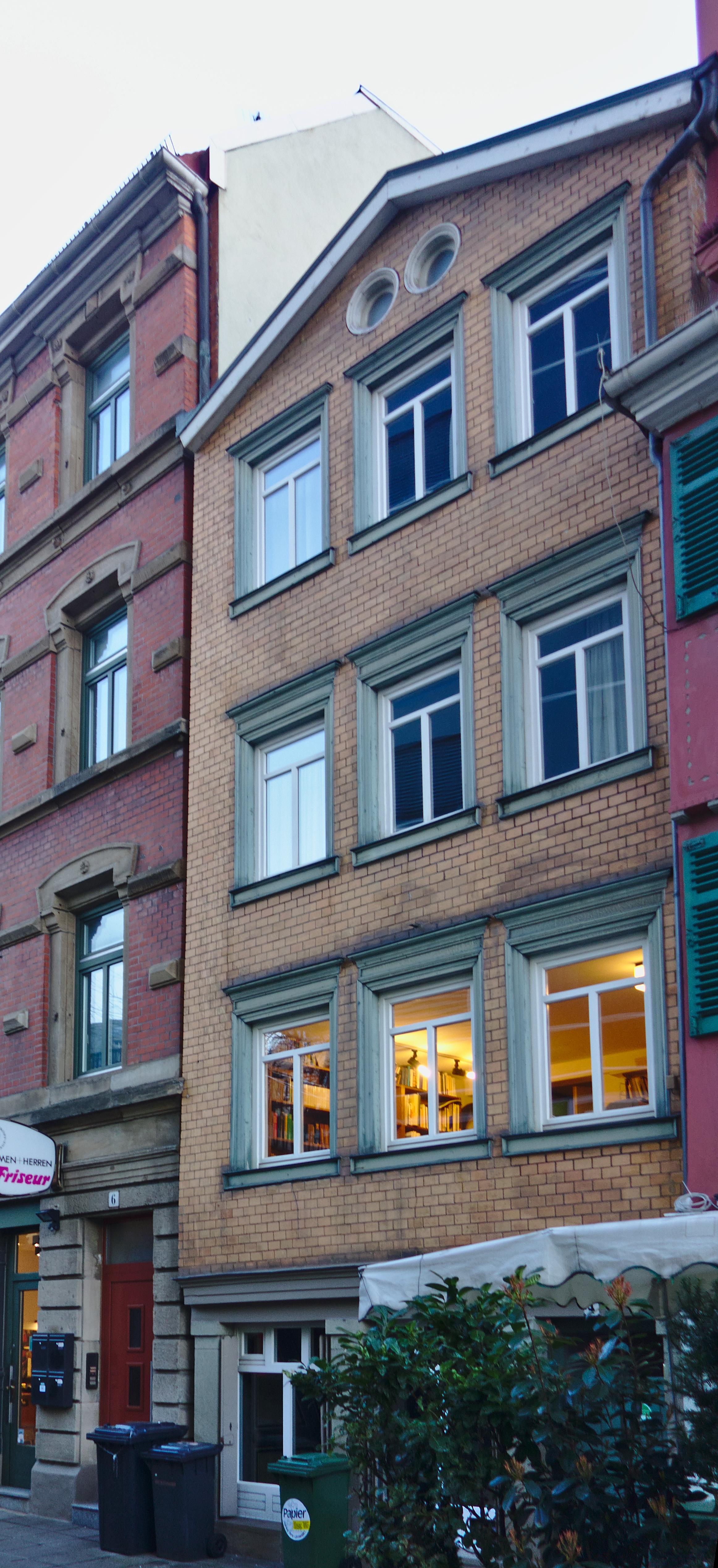 Mietshaus mit Ladenlokal Kanalstraße 4, Stuttgart. Erbaut 1800–1850 von unbekannt, 1860 von Georg Schöttle (Werkmeister) und 1872 von Pfeiffer (Zimmermeister). Spätklassizismus. Geschützt nach § 2 DSchG